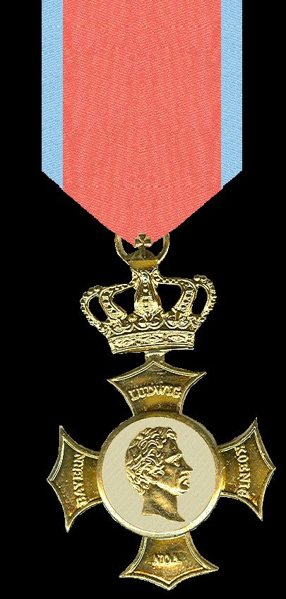 Ludwigs-Orde_(Beieren), Kruis. Eigen scan.